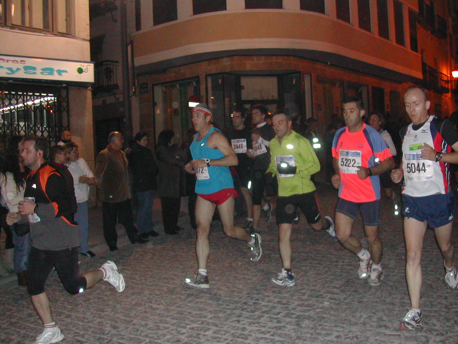 Carrera de San Antón en Jaén.